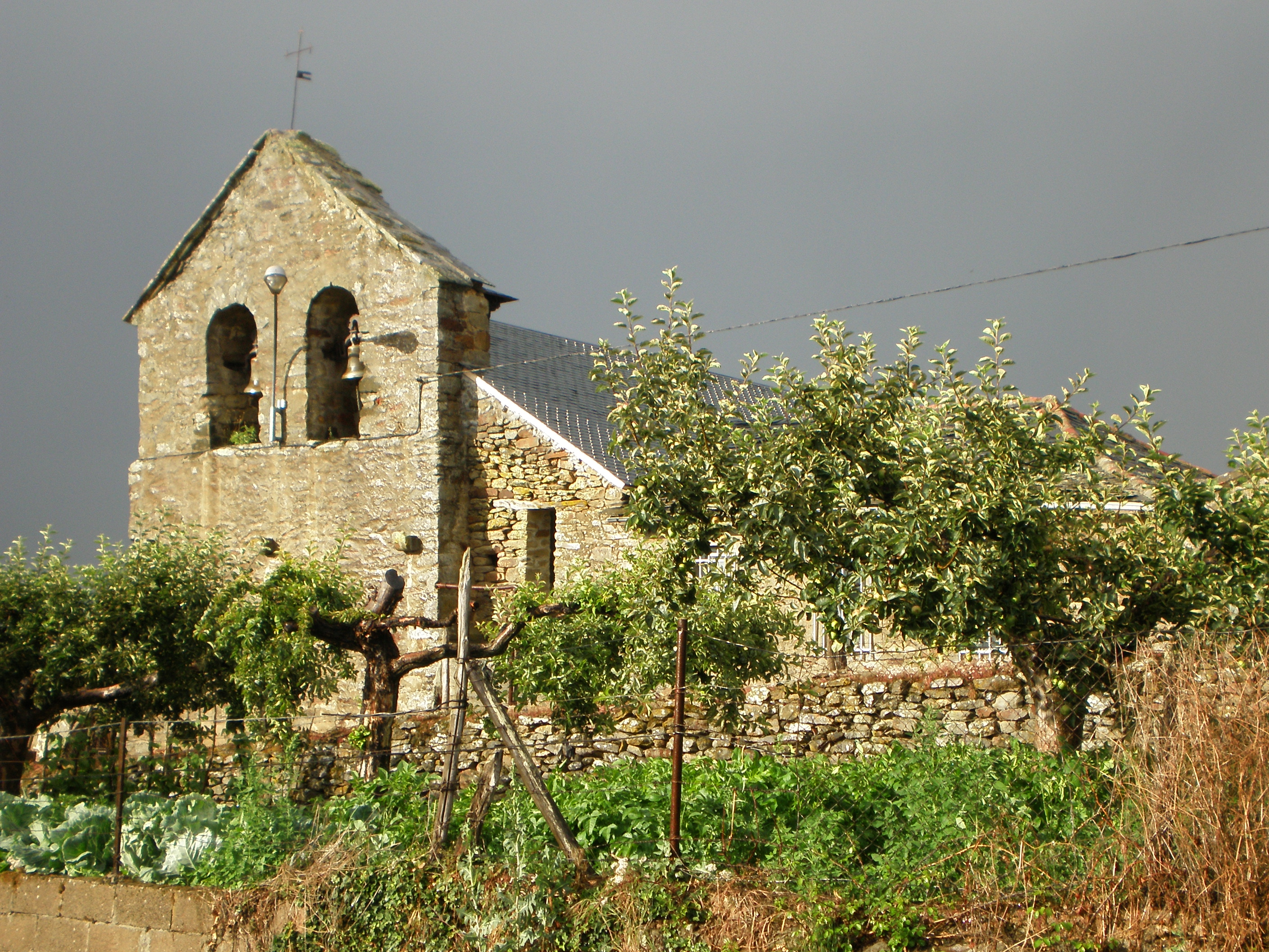 La Granja de San Vicente en el municipio de Torre del Bierzo (El Bierzo, provincia de León, Castilla y León, España).